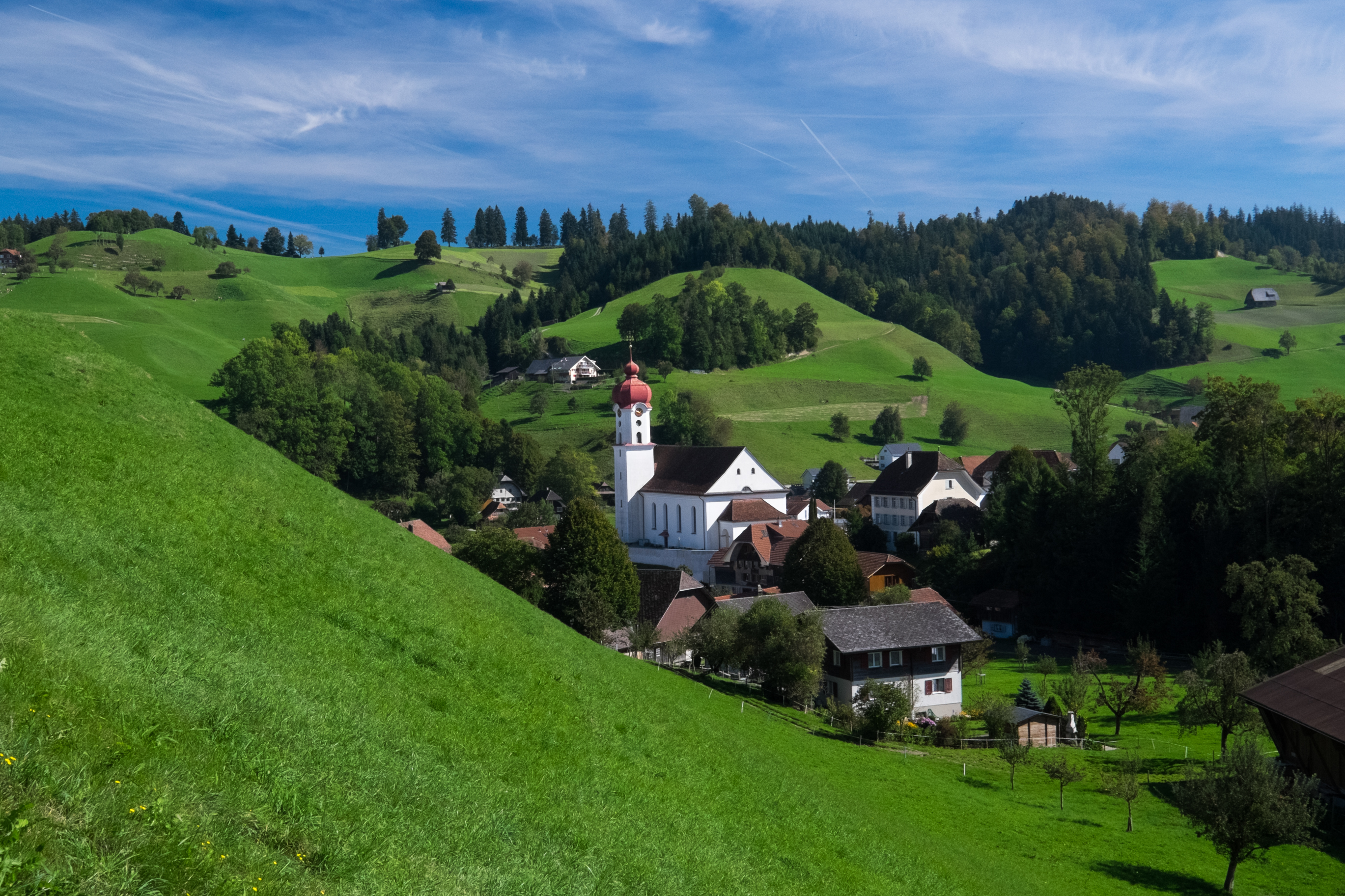 Der Dorfkern von Luthern auf der Anhöhe zur Heuberg Kapelle aus gesehen.